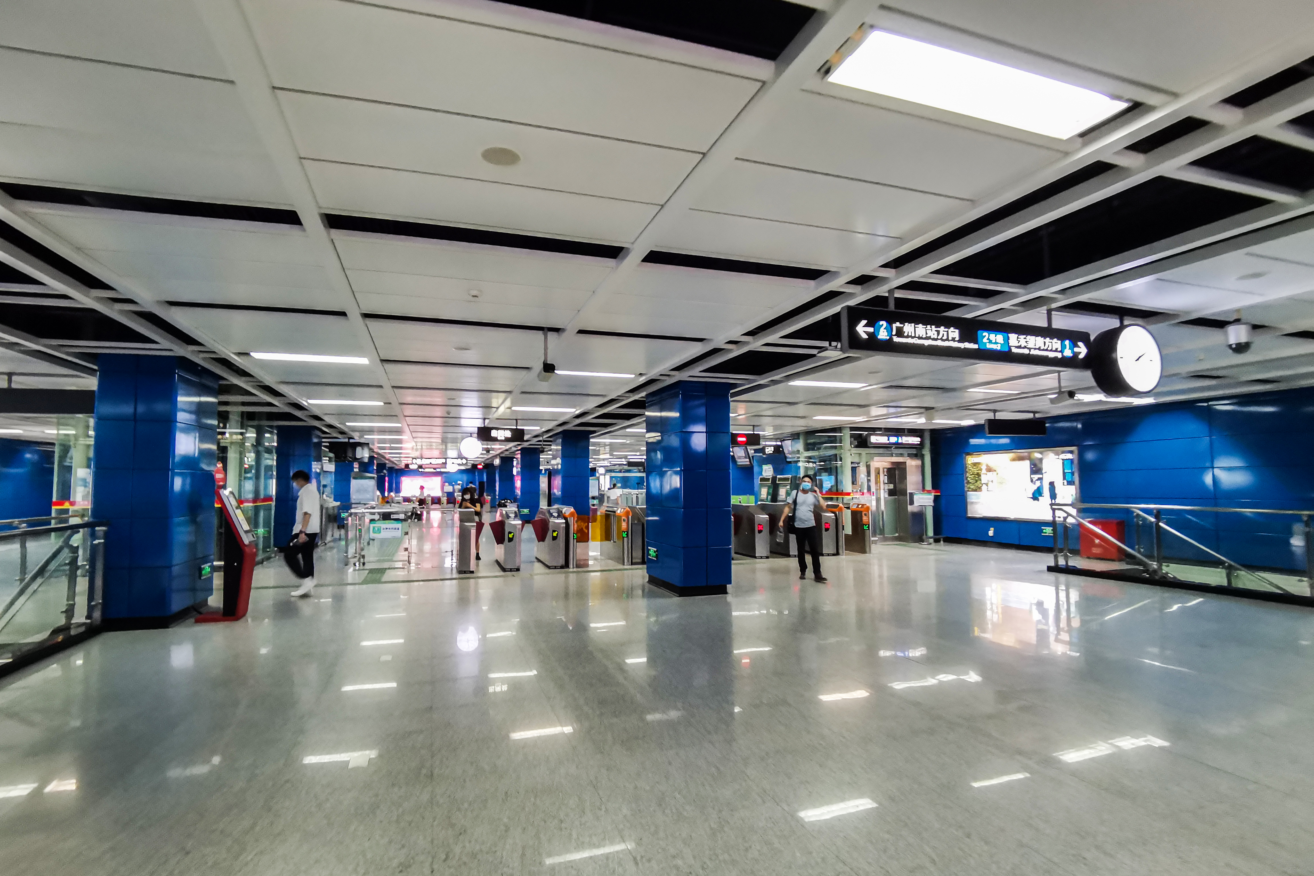 广州地铁萧岗站